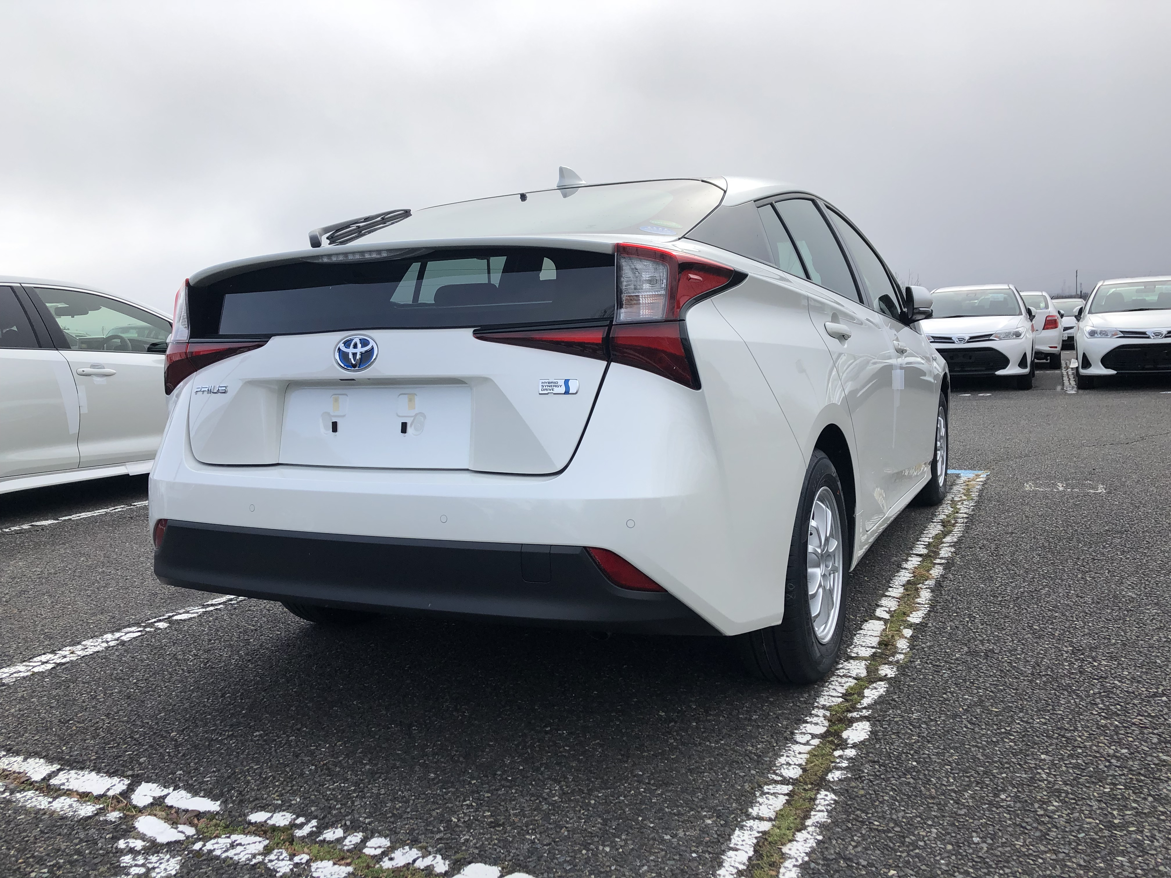 2018年12月改良型プリウスをリアより撮影。